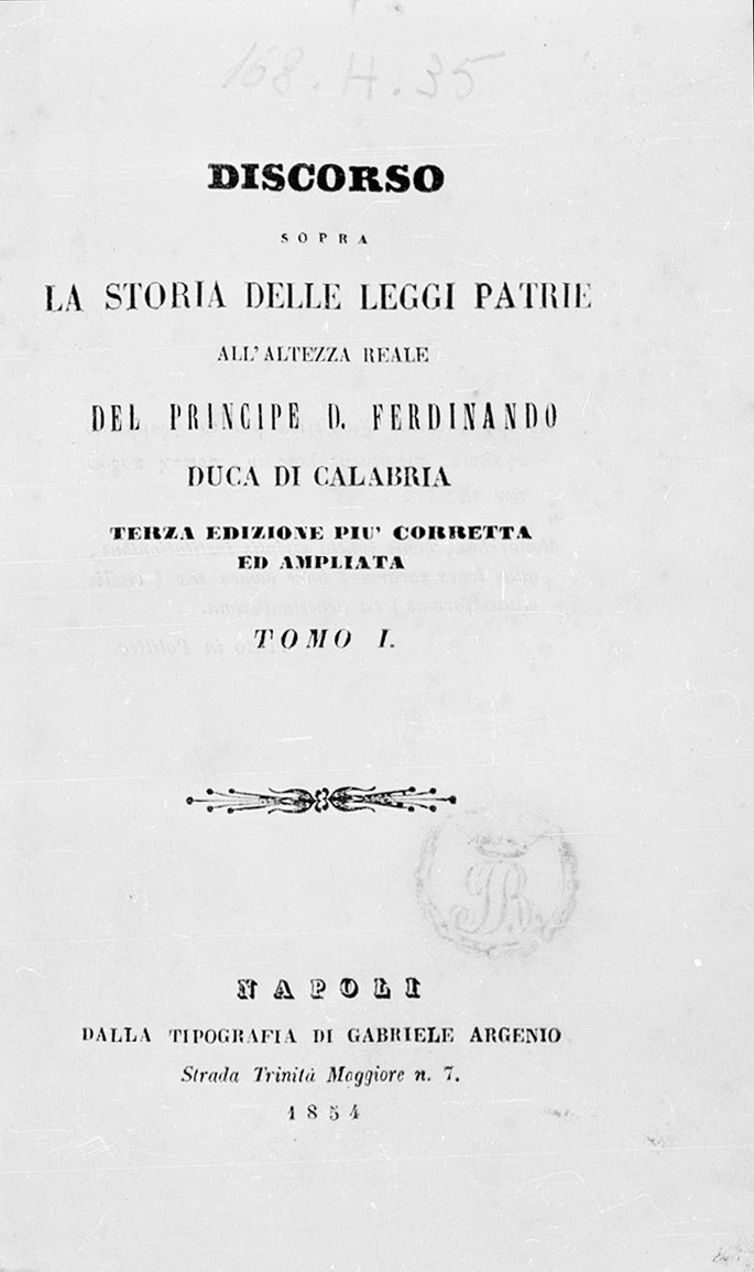 Frontespizio